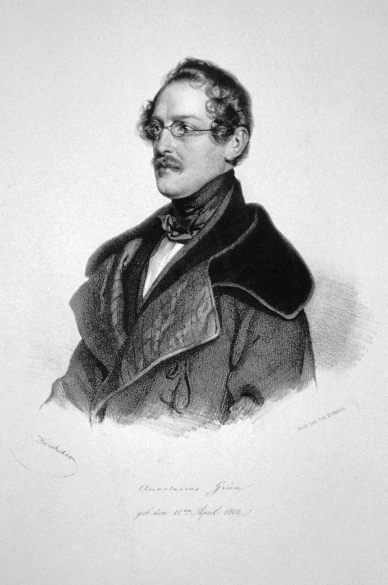 Anastasius Grün, eigentlich Anton Alexander Graf von Auersperg (1806-1876), österreichischer Dichter und Politiker. Lithographie von Josef Kriehuber, um 1840